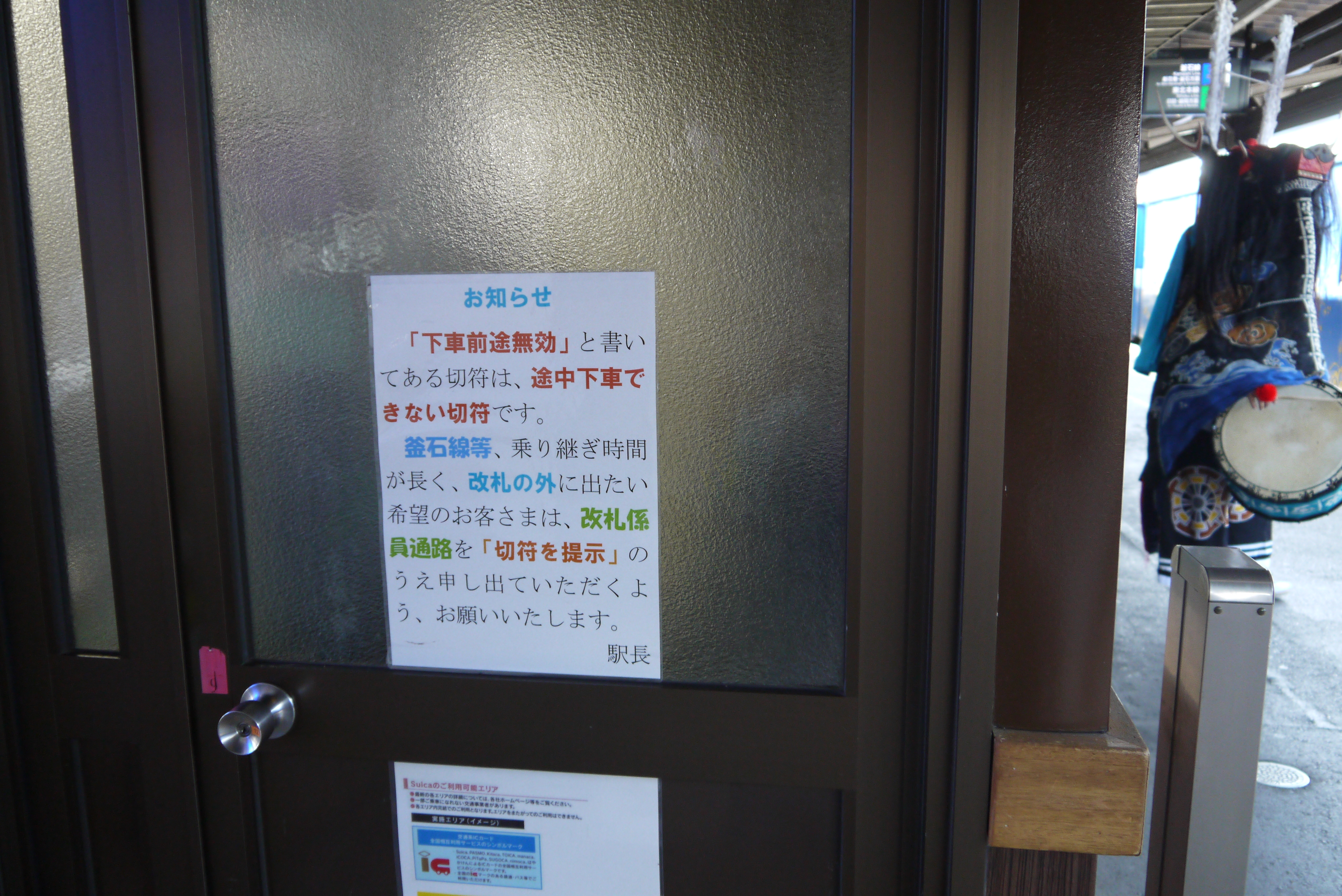 花巻駅の改札口で撮影。接続時間が長い場合の特別下車認める掲示である。